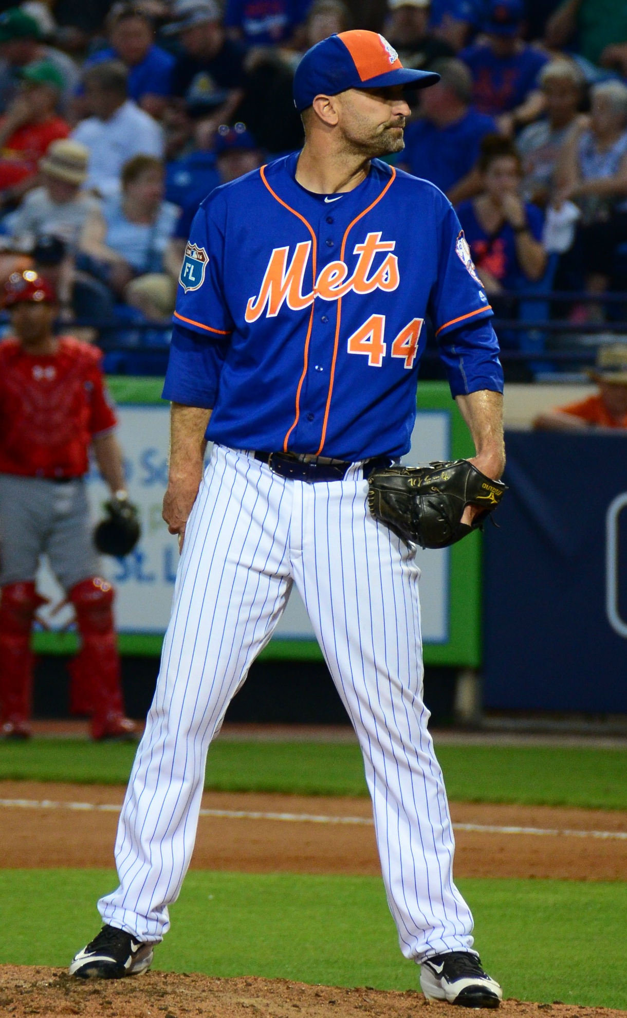 Buddy Carlyle